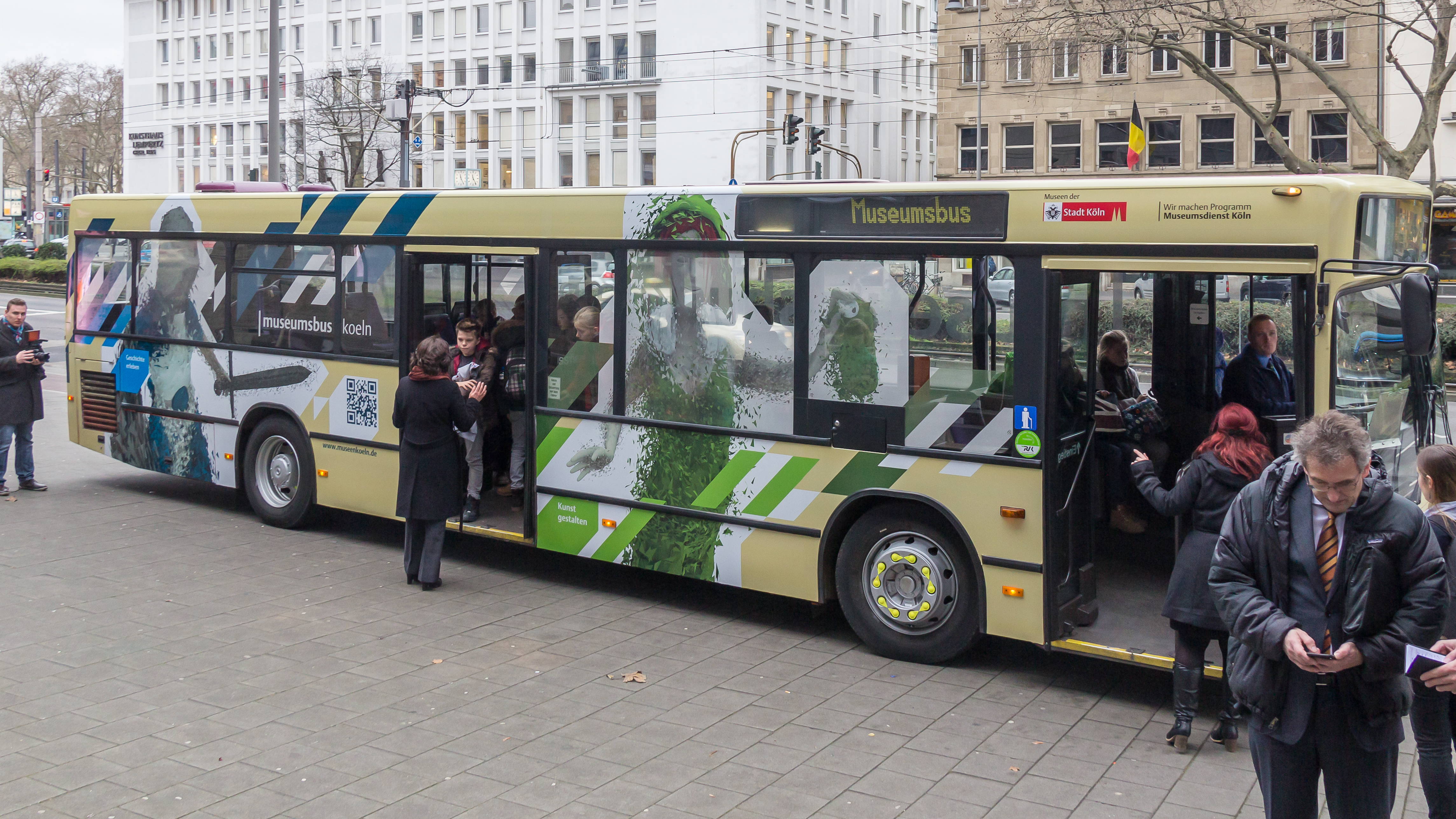 Vorstellung und Pressekonferenz des neuen „museumsbus koeln“ durch den Museumsdienst Köln. Es fand eine Jungfernfahrt für eine Kulturklasse des Abtei-Gymnasiums Brauweiler von Pulheim nach Köln zum Rautenstrauch-Joest-Museum statt. Der Bus bringt seit dem 12. Januar 2015 im Wechsel jeweils zwei Wochen hintereinander Schulklassen aus dem Rhein-Sieg-Kreis, dem Rhein-Erft-Kreis, dem Kreis Euskirchen, dem Rheinisch-Bergischen und dem Oberbergischen Kreis zu allen städtischen Museen und dem Käthe-Kollwitz-Museum.